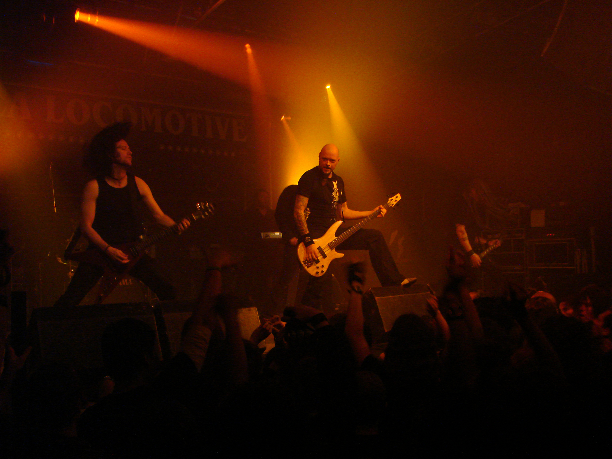 Dark Tranquillity, concert du 12/10/07 à la Locomotive à Paris.